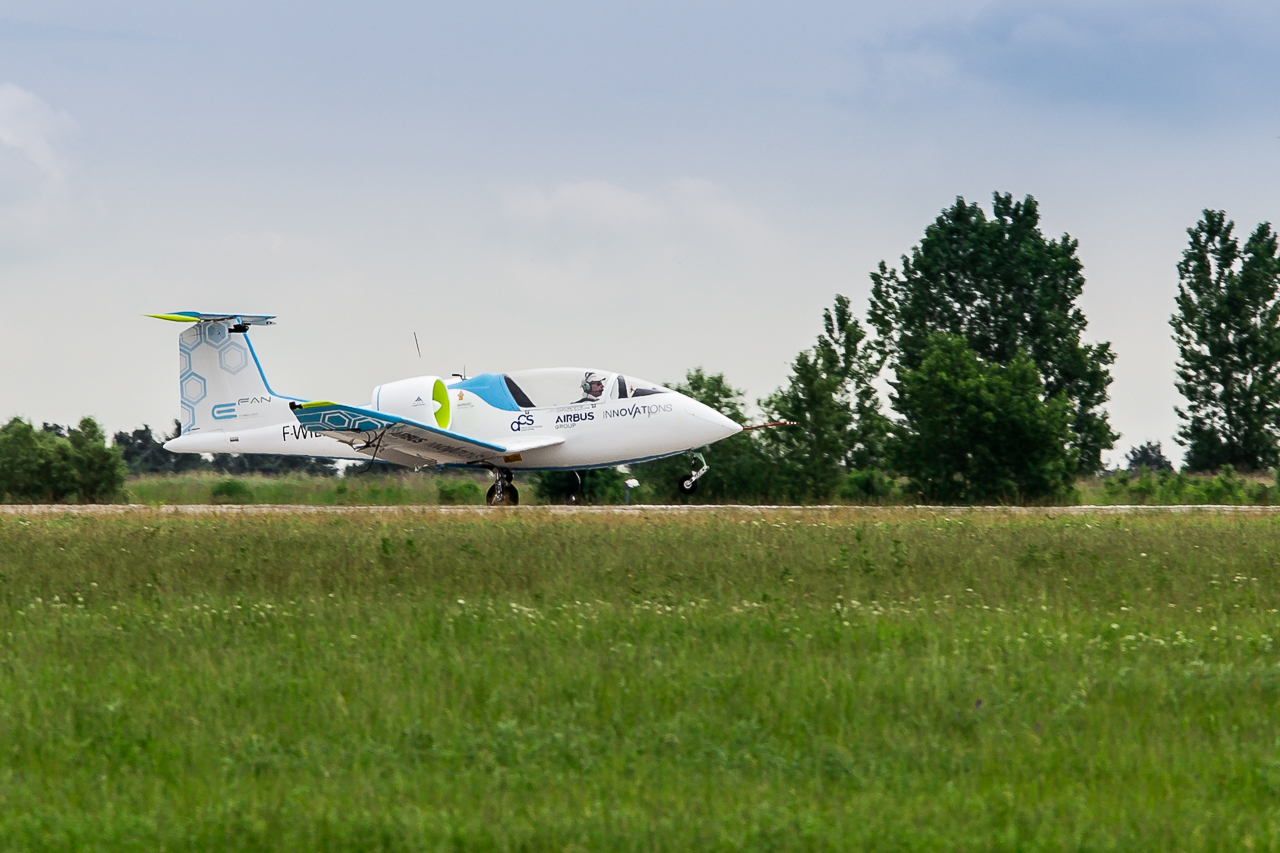 E-FAN Airbus Group Innovations